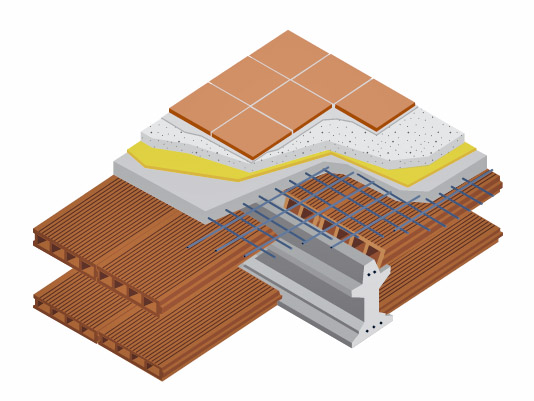 L'immagine "Solaio di tipo "Varese" con intercapedine e tavelloni" è tratta dal libro di Antonio Laurìa "Tavelloni e tavelle in laterizio Le tipologie e gli scnari d'impiego in edilizia", Roma, Laterservice, 2005.